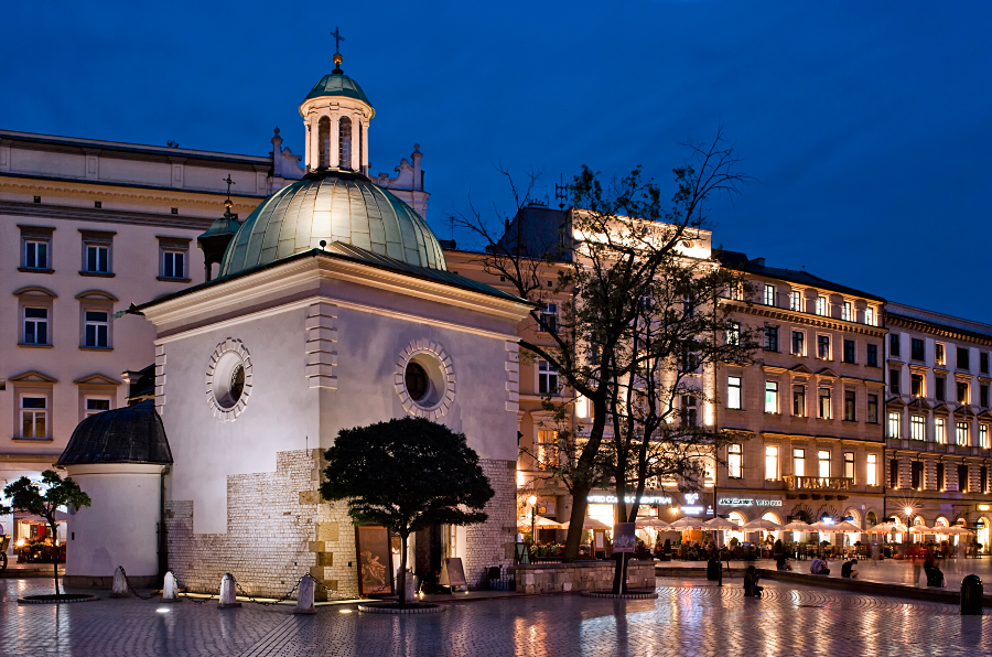 Kraków, kościół p.w. św. Wojciecha, XI/XII, 1611-1618, 1780